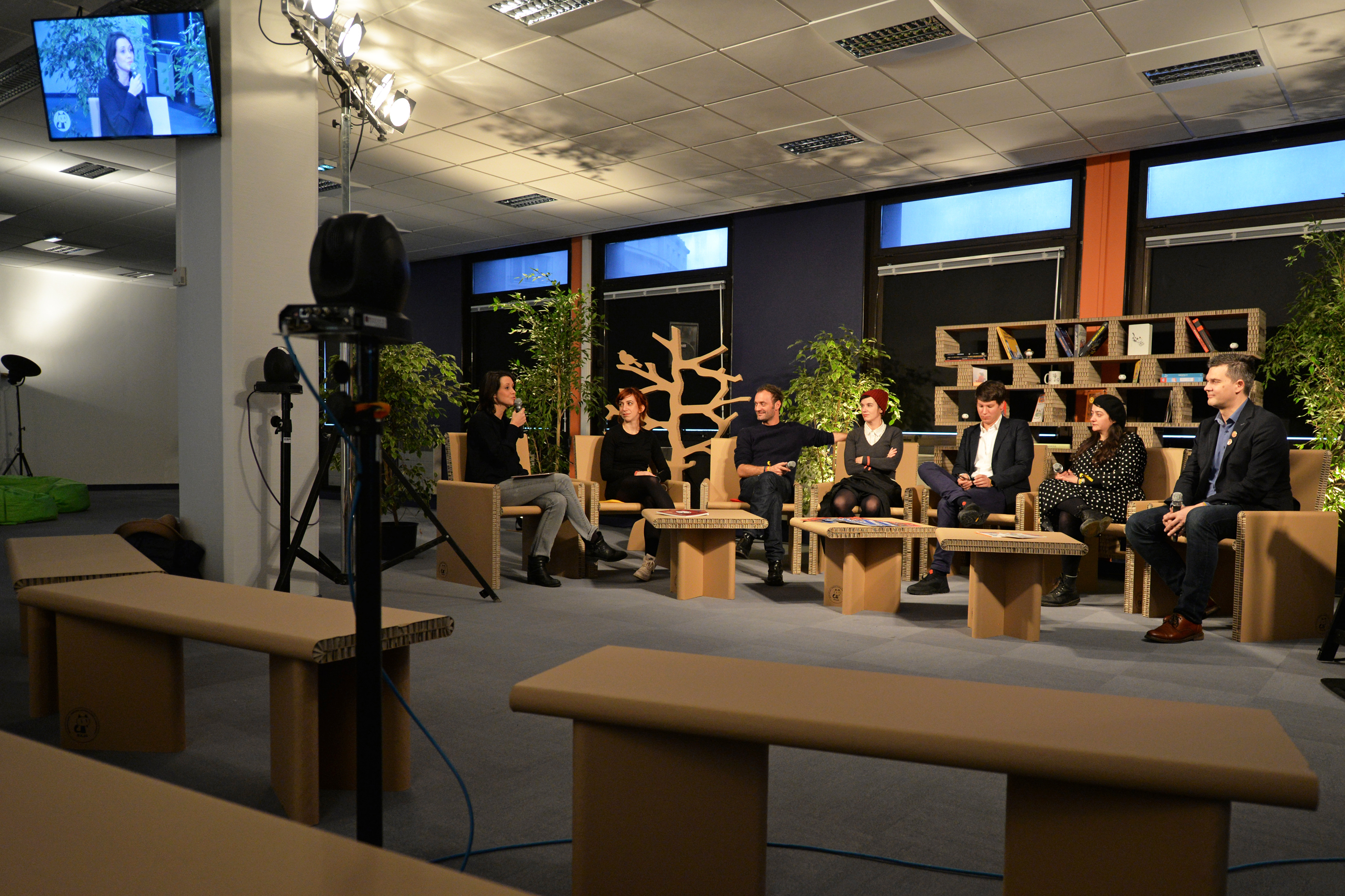 Jury du festival 2019 sur le plateau de la web TV interrogé par Sonia Déchamps. Présidé par l'autrice Dominique Goblet, le jury comprend également l'autrice Pénélope Bagieu, le délégué artistique de l'Orchestre de Paris Édouard Fouré Caul-Futy, l'animateur Augustin Trapenard, la journaliste Pauline Croquet et le libraire Jérôme Briot. Festival International de la Bande Dessinée d'Angoulême 2019.